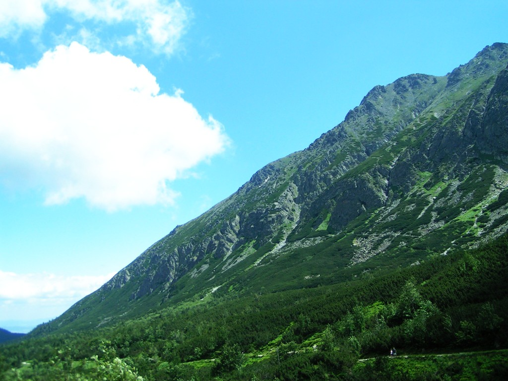 Kozí štít